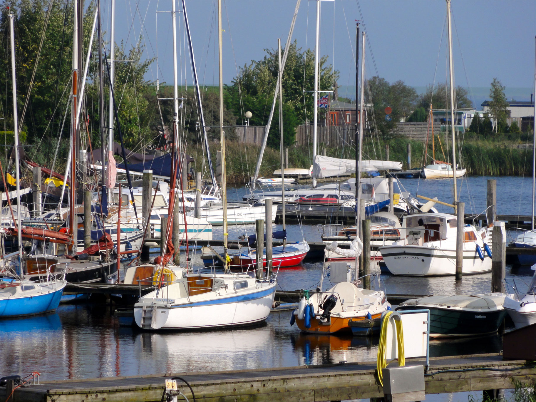 Jachthaven van Oostmahorn